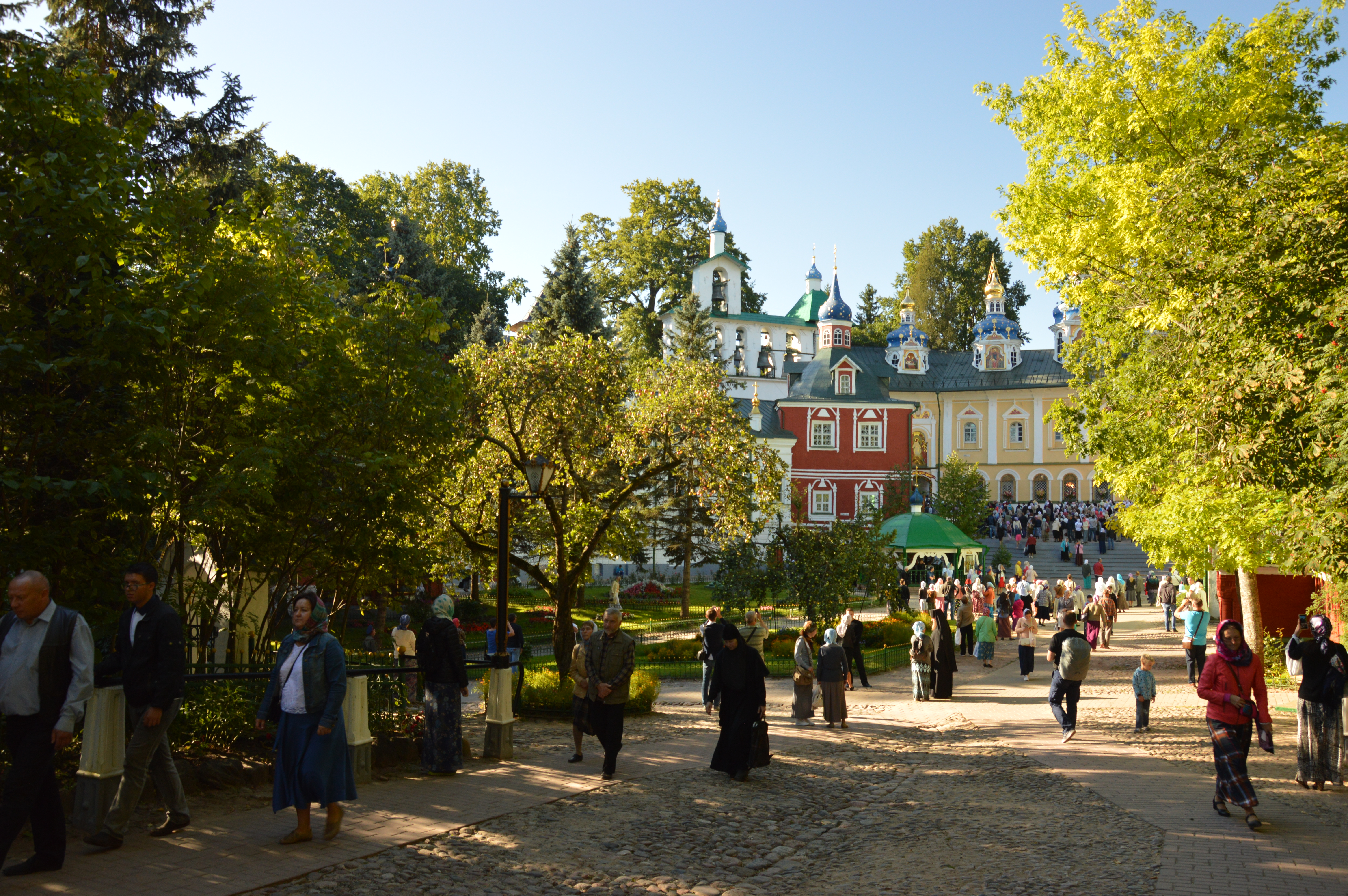 Petseri klooster maarjapäeval.